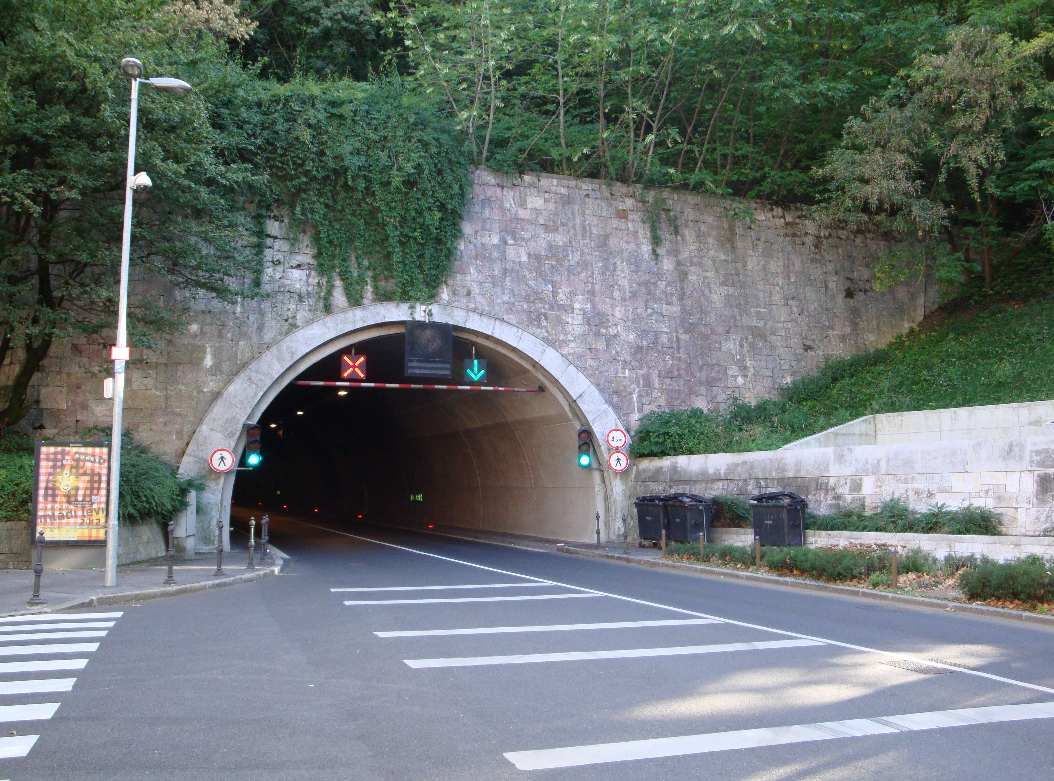 Predor, Ljubljana, Slovenija